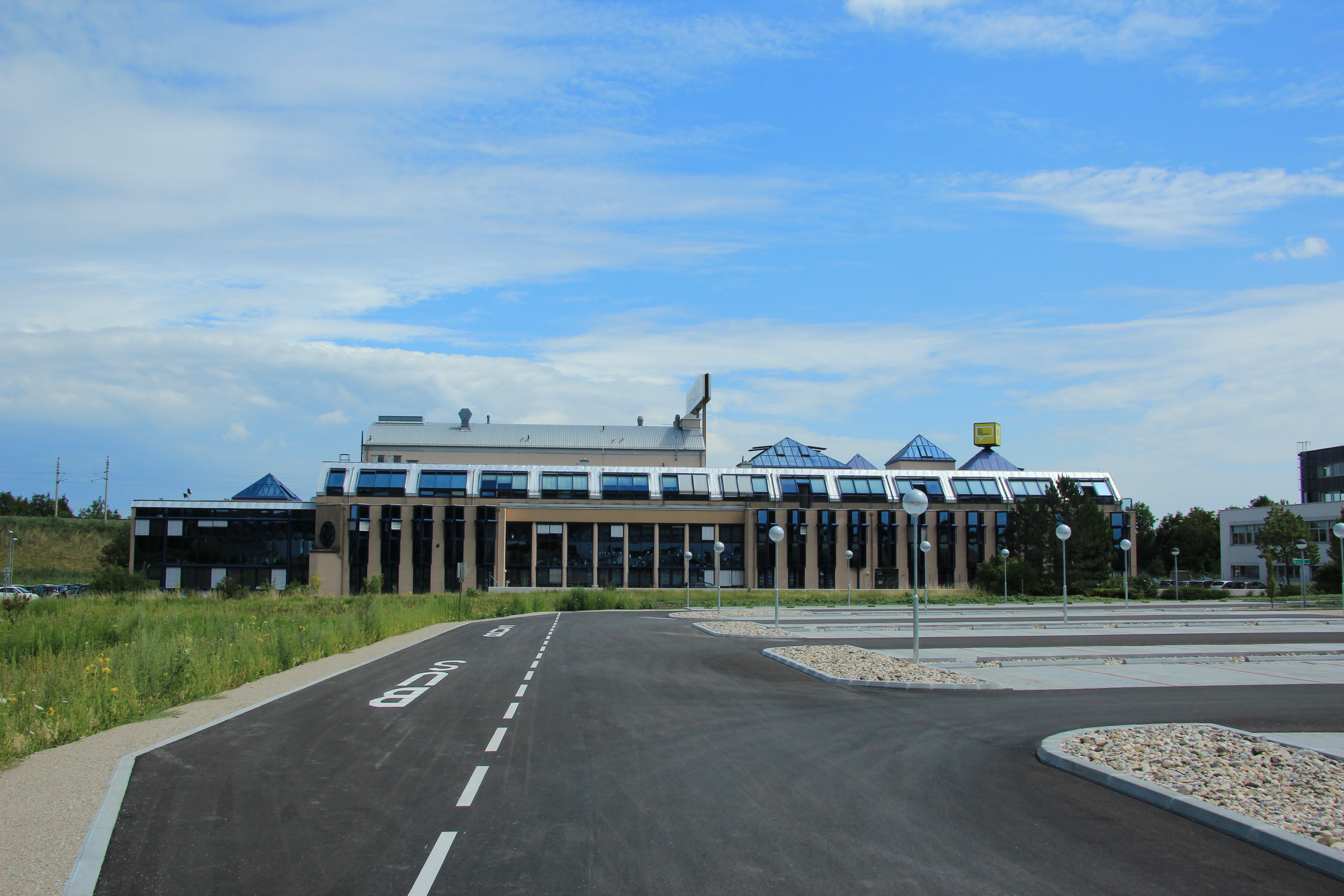 Bürogebäude von Herold in Mödling